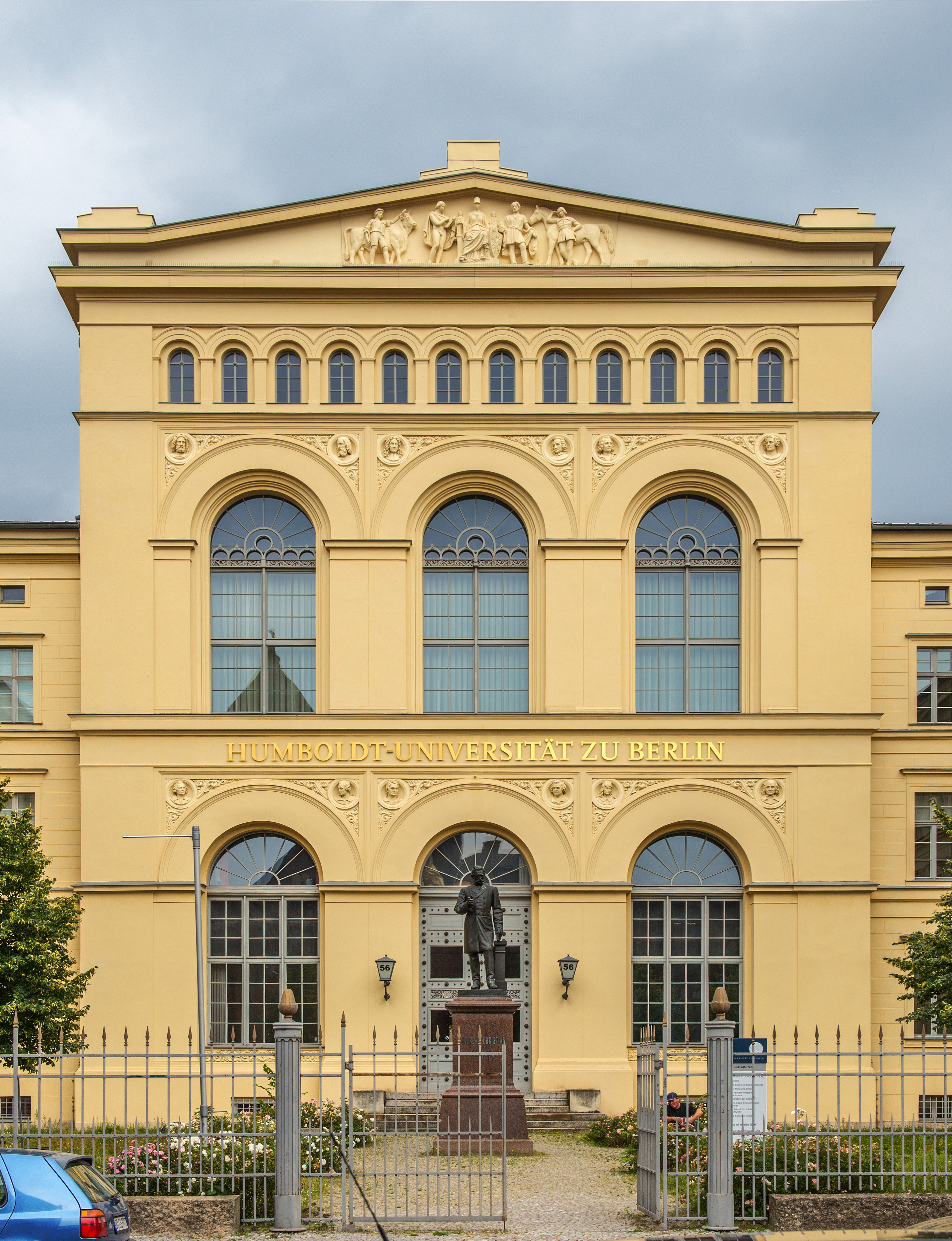 Ehem. Tierarzneischule, Luisenstraße 56, 10117 Berlin, Sitz der Humboldt Graduate School